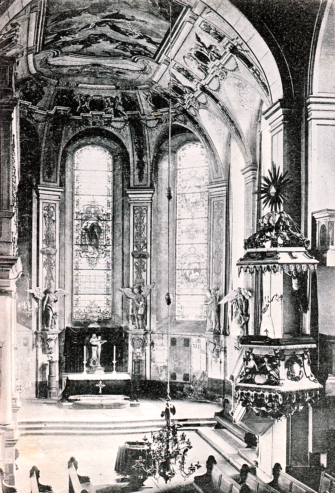 Gotha, Margarethenkirche, Alterraum (um 1900)